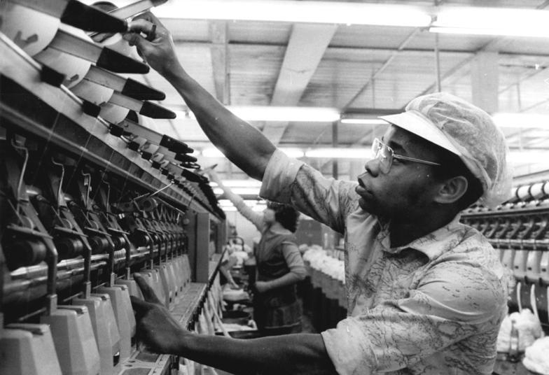 Mittweida, Gastarbeiter aus Mosambik Zum Beitrag: Mittweider Lehrjahre der Textilarbeiterin Houng-Berufsausbildung junger Vietnamesinnen in der DDR ADN-ZB Ritter-18.6.1987 Joao Nanelo aus Mocambique, der hier gerade im Maschinensaal der Baumwollspinnerei Mittweida im Bezirk Karl-Marx-Stadt eine Spinndüse repariert, ist bereits ein geübter Mechaniker. Gemeinsam mit etwa 100 seiner Landsleute erhielt auch er hier eine Berufsausbildung. (Hierzu gehören die Fotos 1987-0618-300N und 301N!)